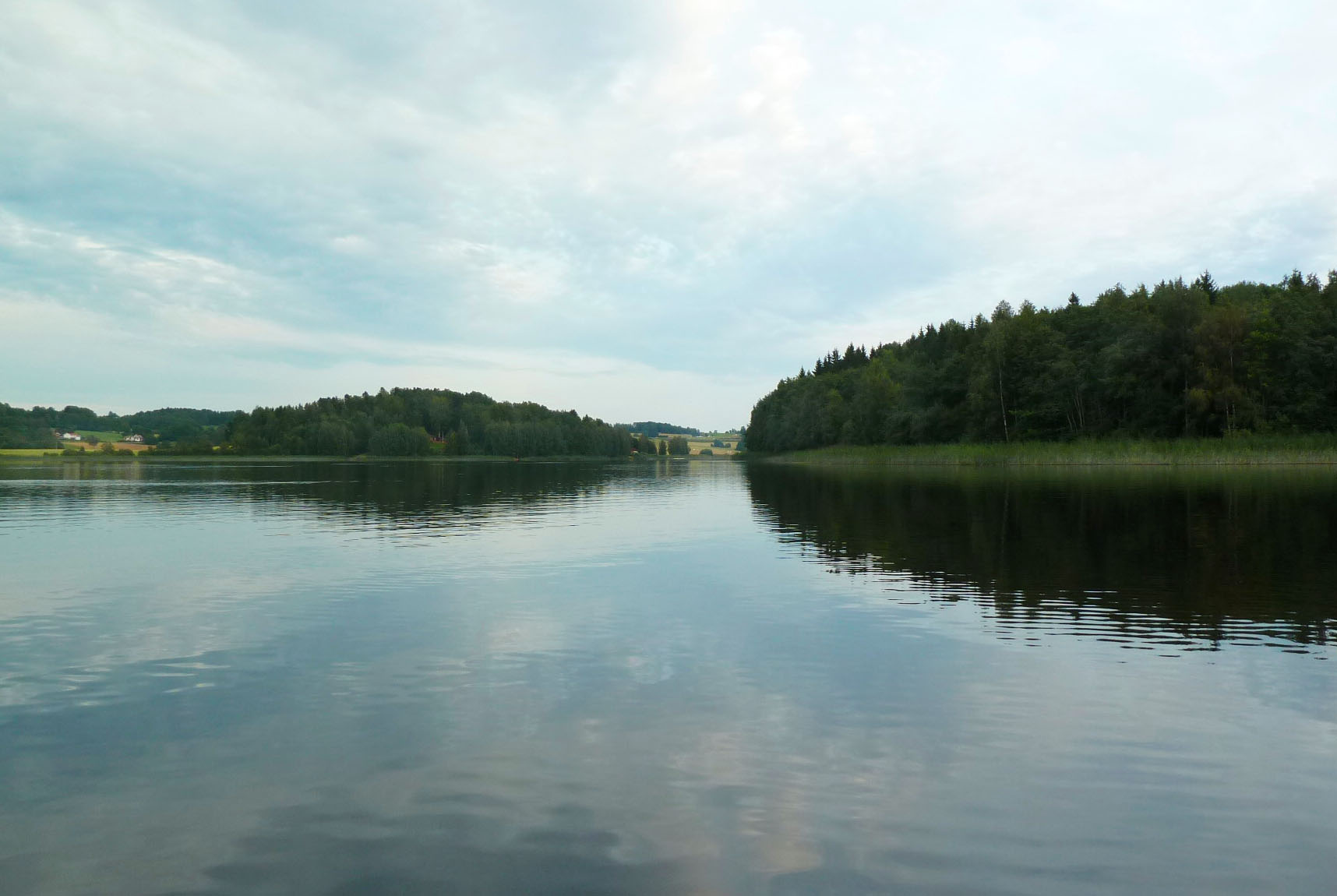 Goksjø.